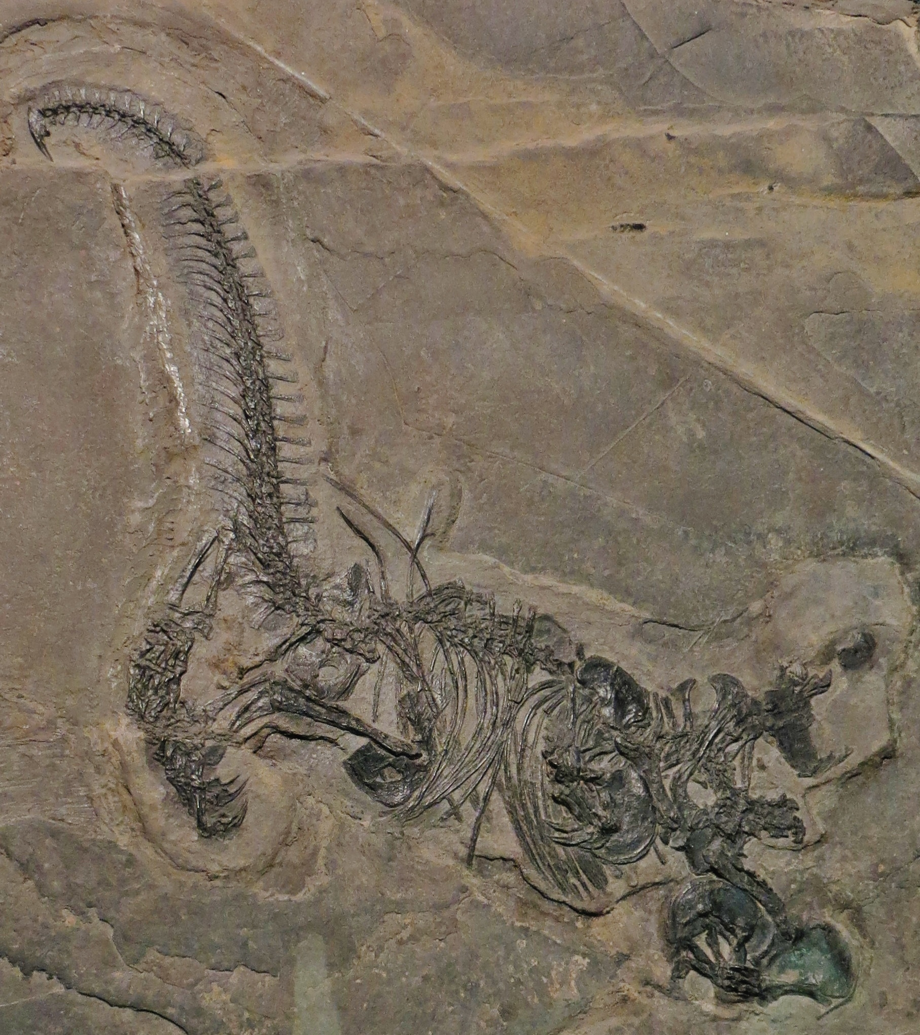 Fossil of Drepanosaurus, an extinct reptile- Took the picture at Museo di Scienze Naturali, Bergamo